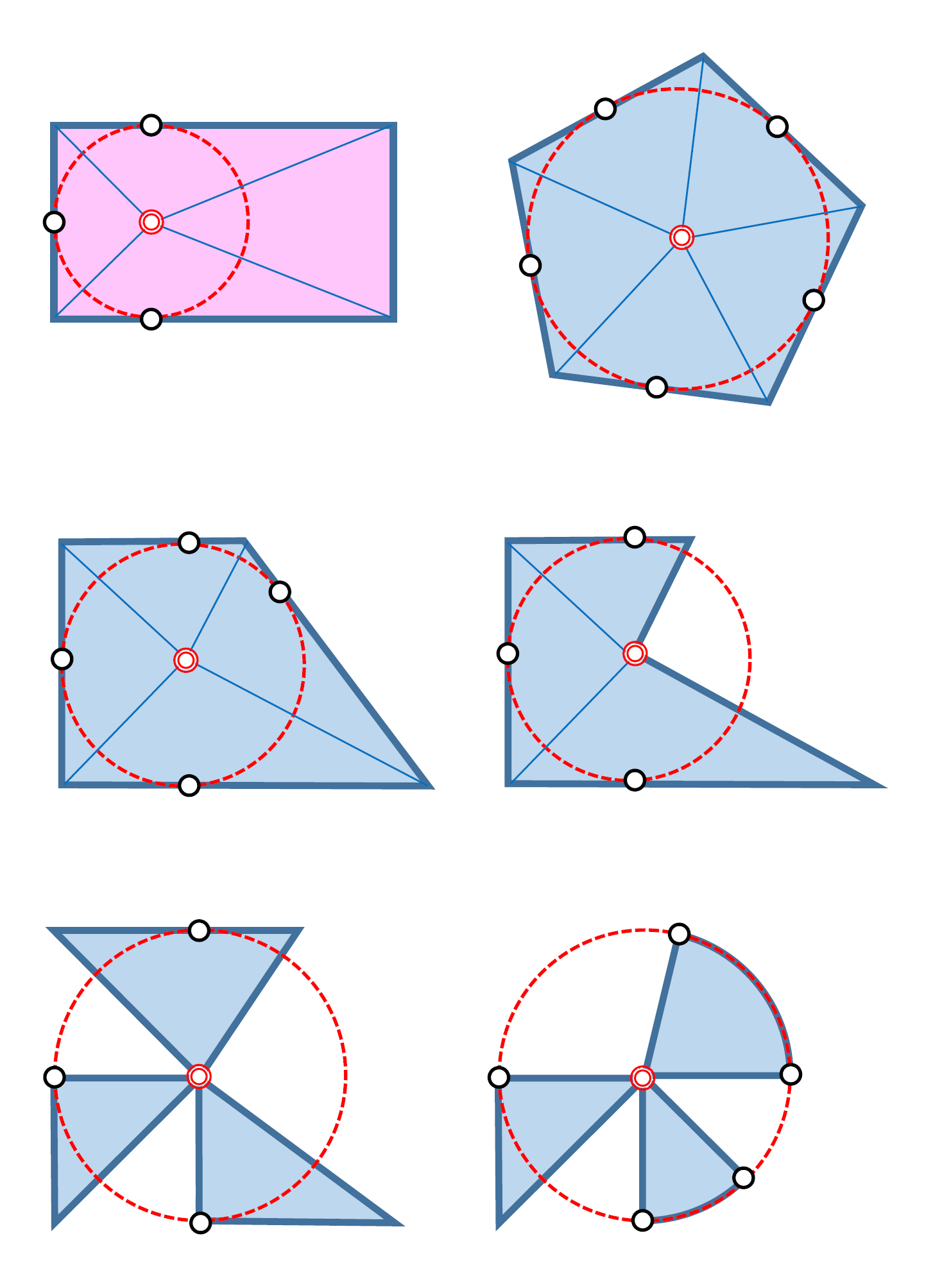 Distintos casos de circungonos, con el rectángulo como contraejemplo.